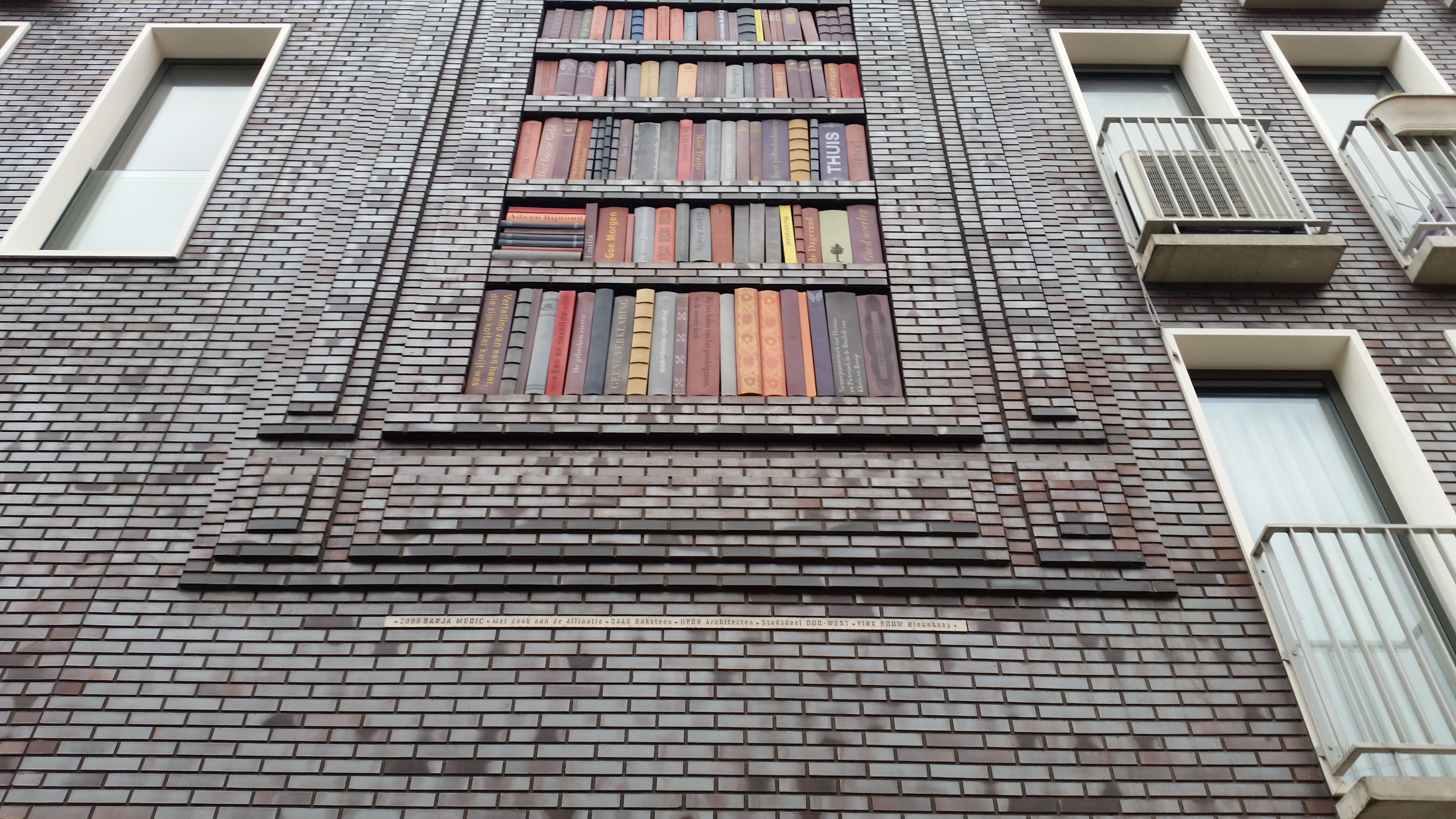 De onderste planken van De Batavier of De Boekenkast van Sanja Medic, 2006, keramiek. Lootsstraat, Amsterdam-West